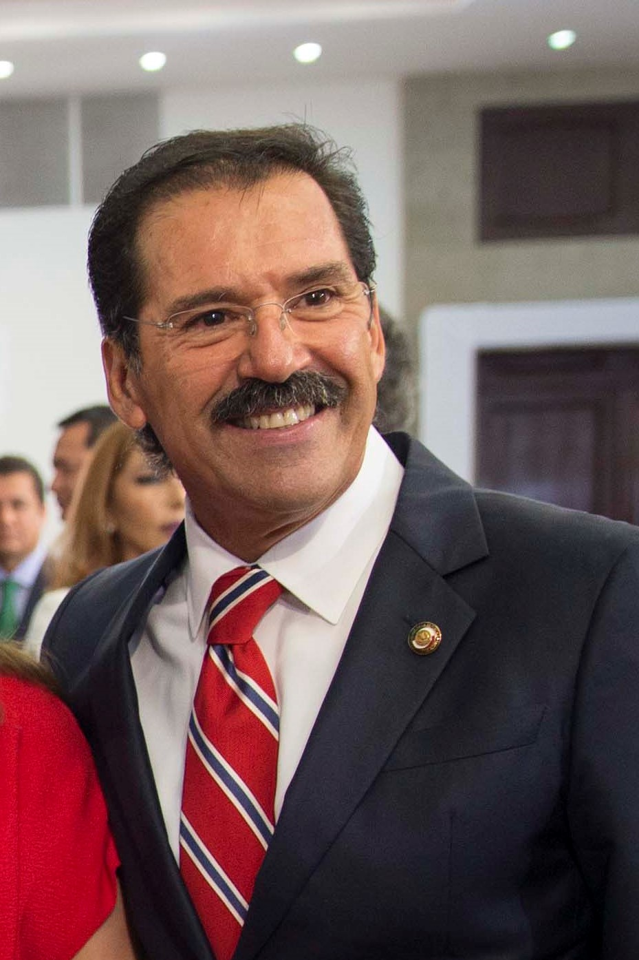 Jesus Casillas Romero, senador de México de 2012 a 2018